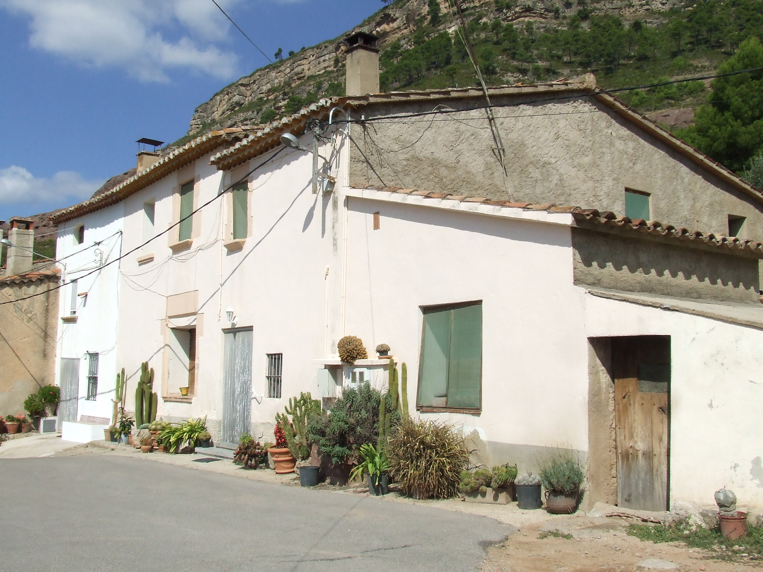 La Vall Blanca (Riells del Fai, Bigues i Riells, Vallès Oriental)